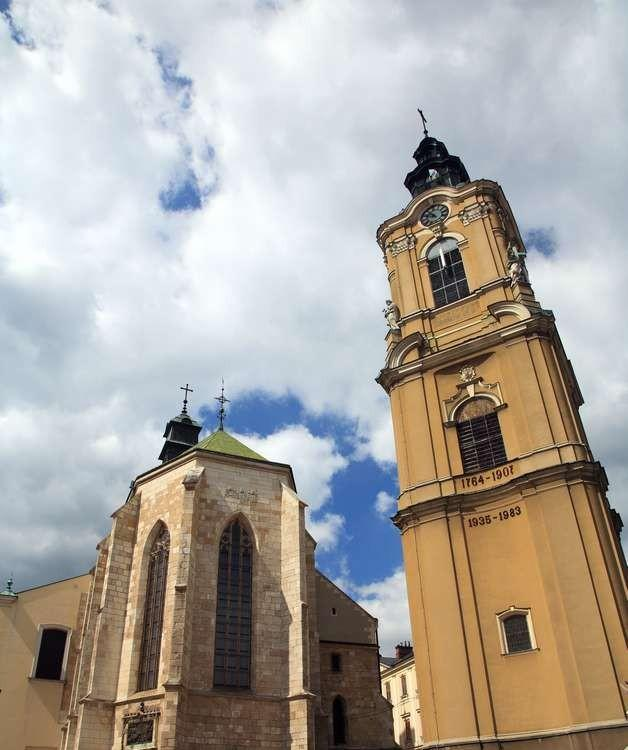 Katedra w Przemyślu